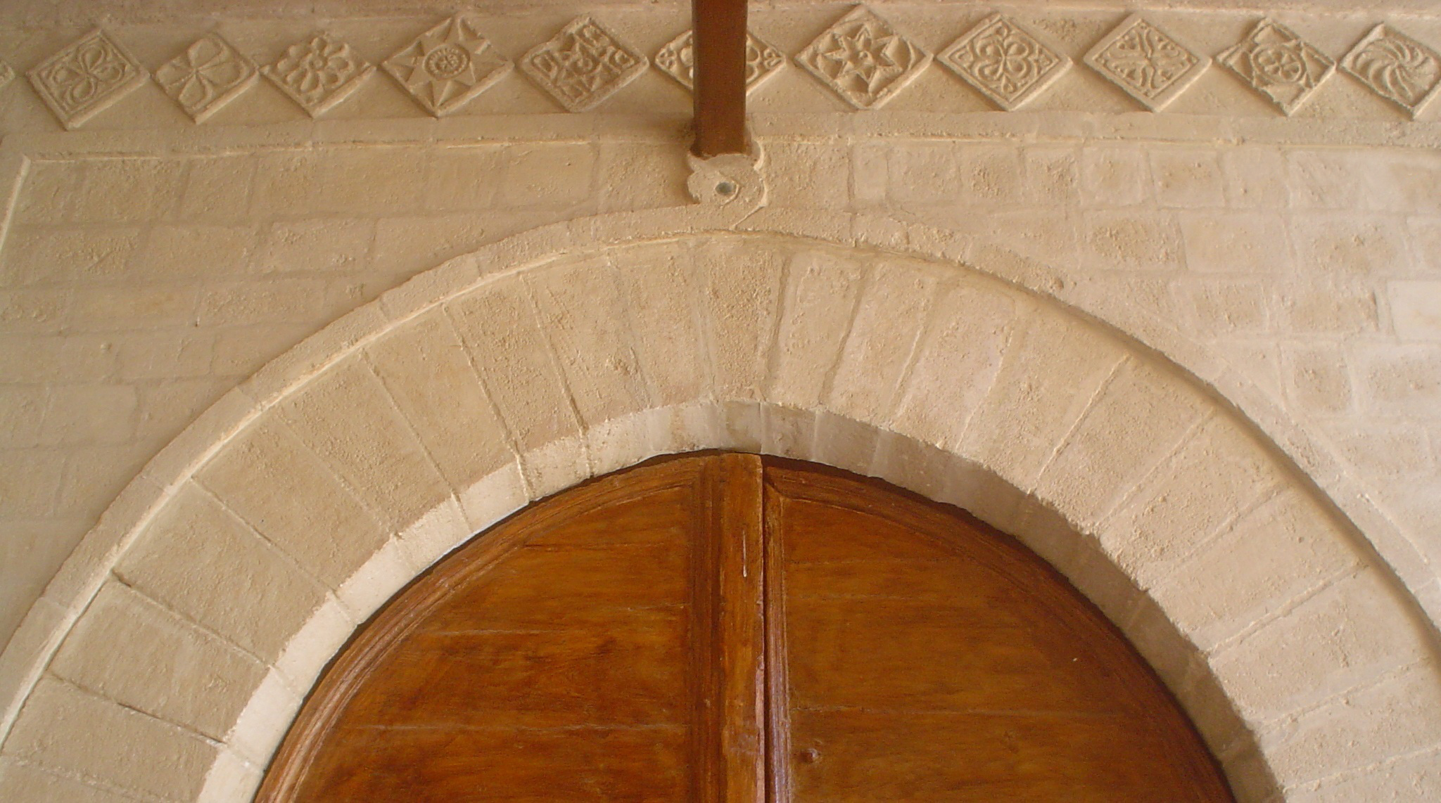 Oqba Ibn Nafi Mosque, Kairouan, Tunisia.